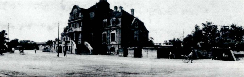 民国早年的天津西站老站房